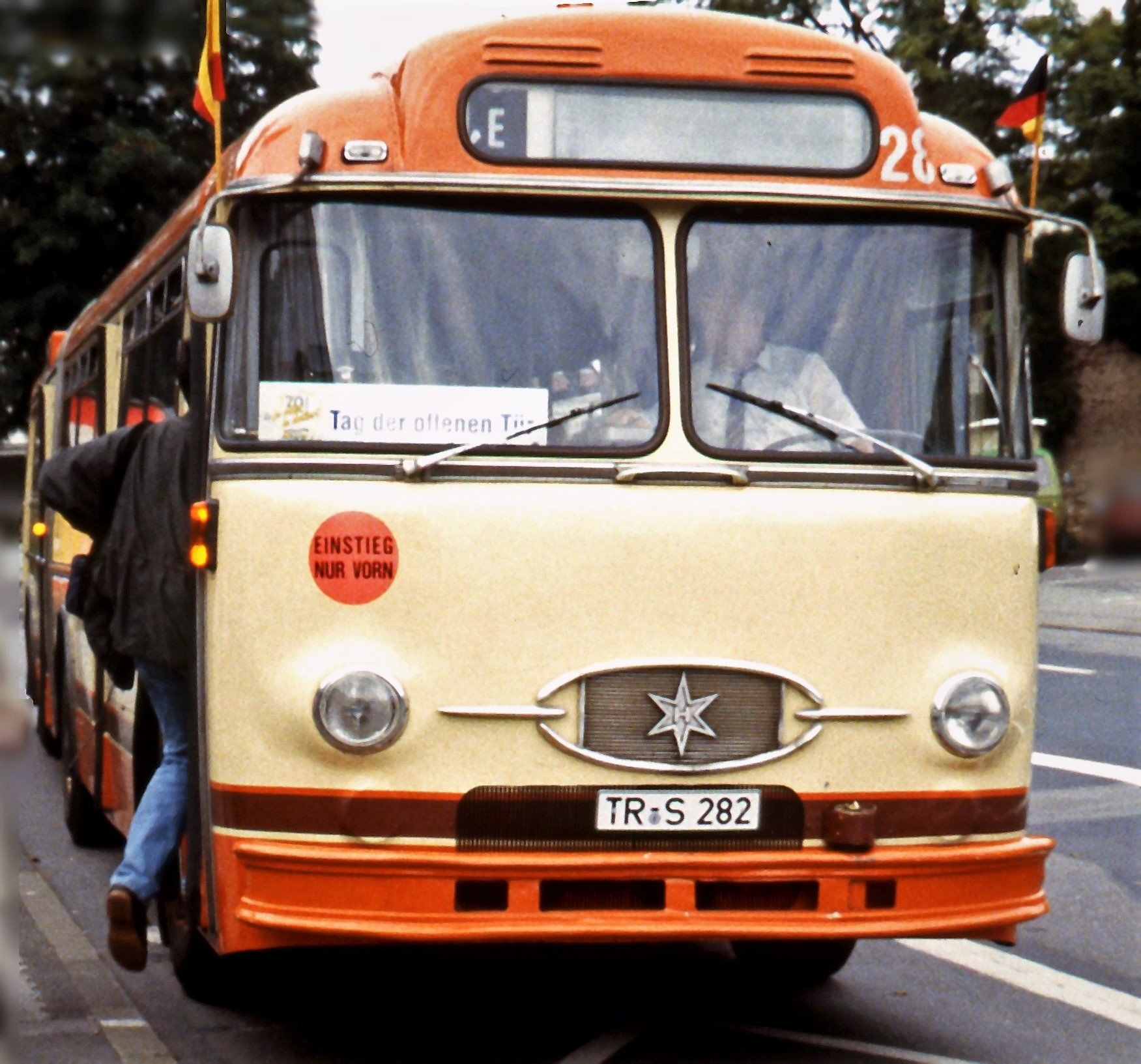 Henschel trolleybus